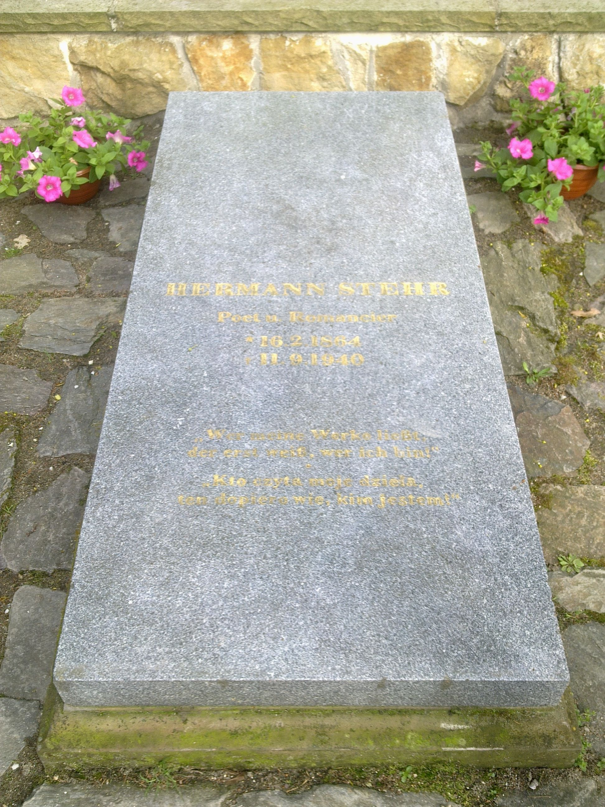 Grab des schlesischen Schriftstellers Hermann Stehr (1864-1940) auf dem Floriansberg (góra parkowa) in Bystrzyca Kłodzka (früher Habelschwerdt), Glatzer Land, Niederschlesien, Polen.